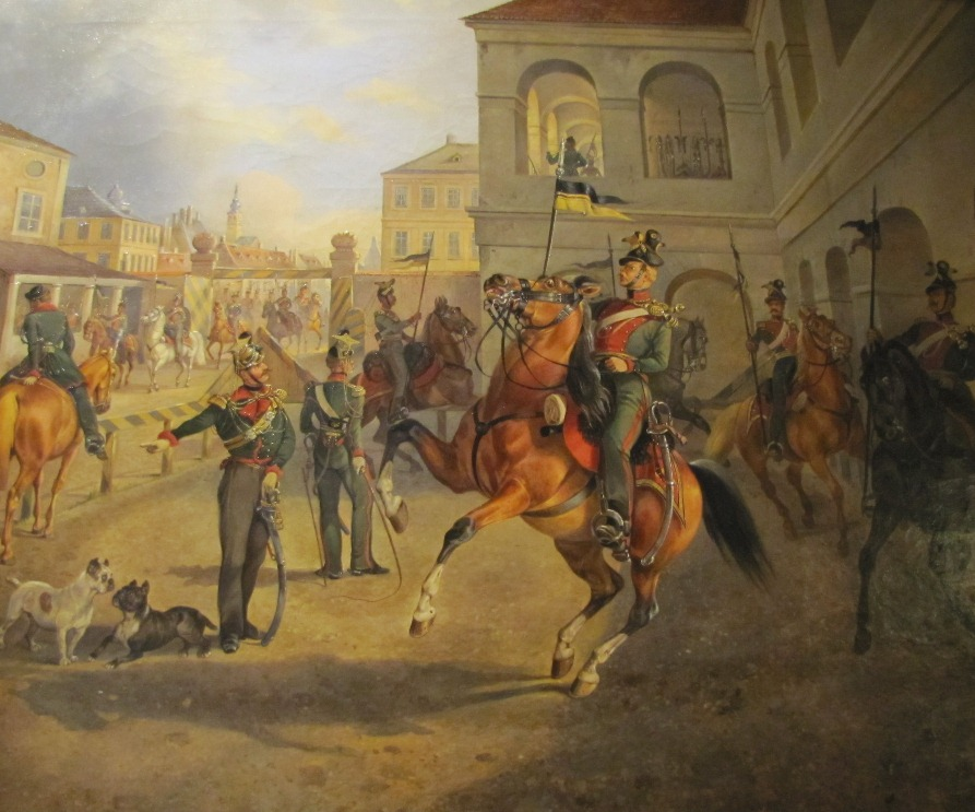 Gemälde im Heeresgeschichtlichen Museum in Wien